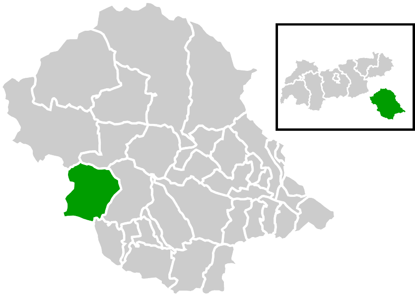 Lage der Gemeinde innerhalb des Bezirks Lienz